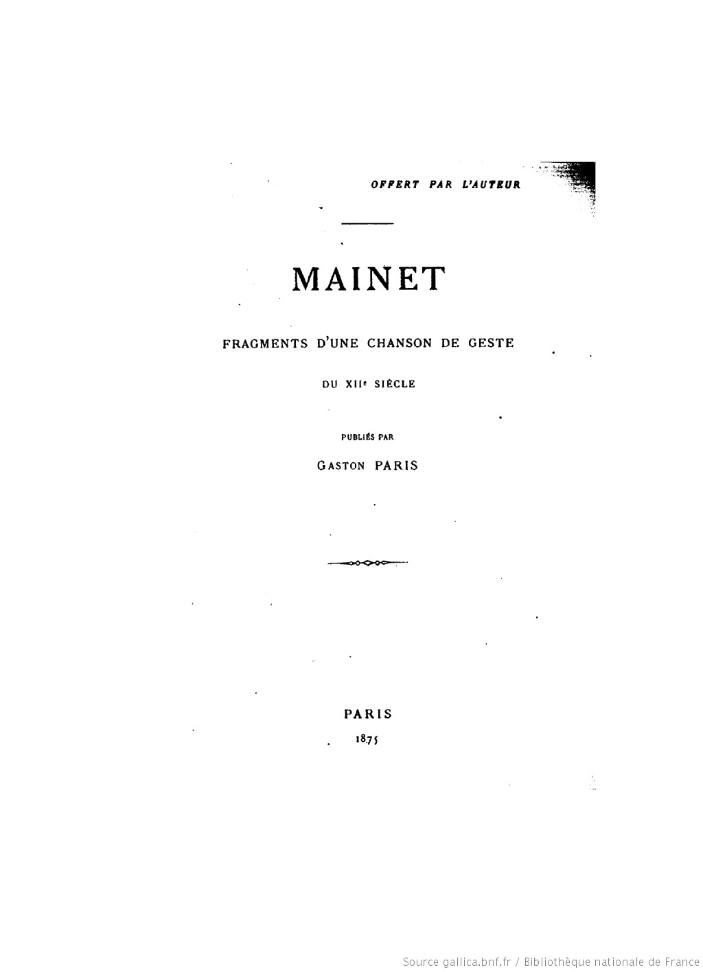 Mainet, chanson de geste